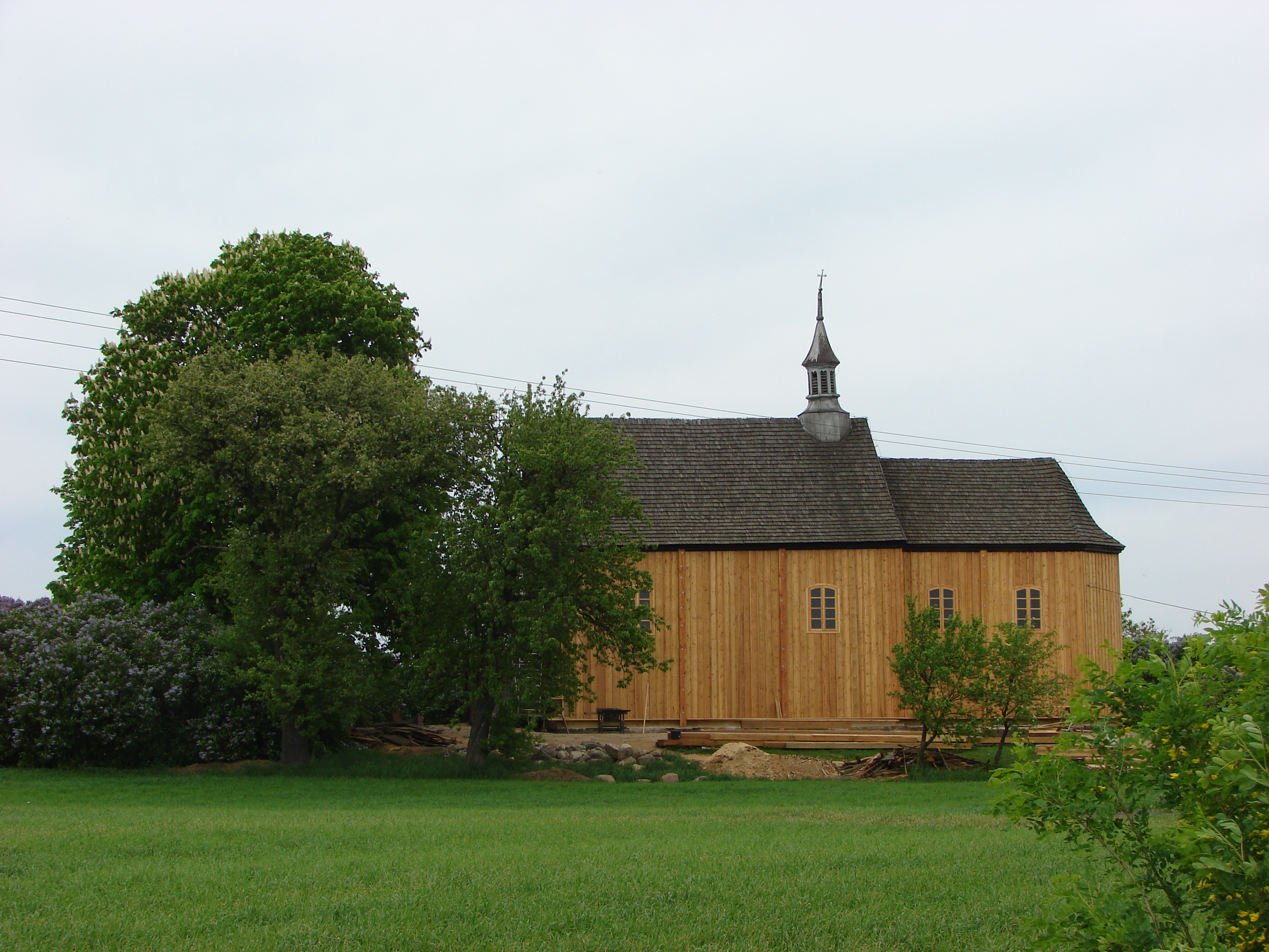 Church of Saints Stanislaus and Mary Magdalene, XVIII century